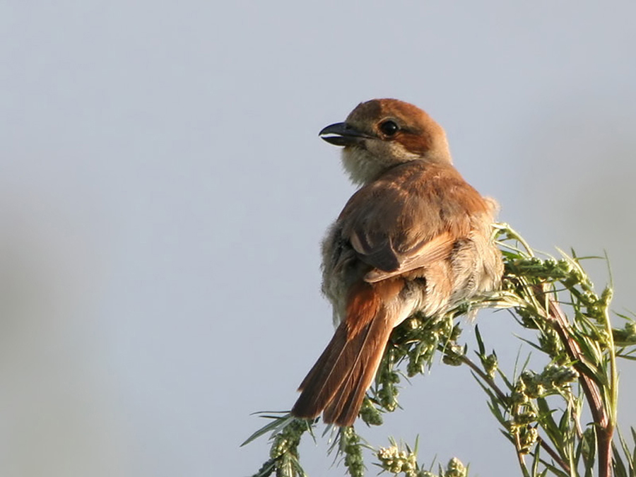 Neuntöter (Lanius collurio), Weibchen, Rieps, Nordwestmecklenburg